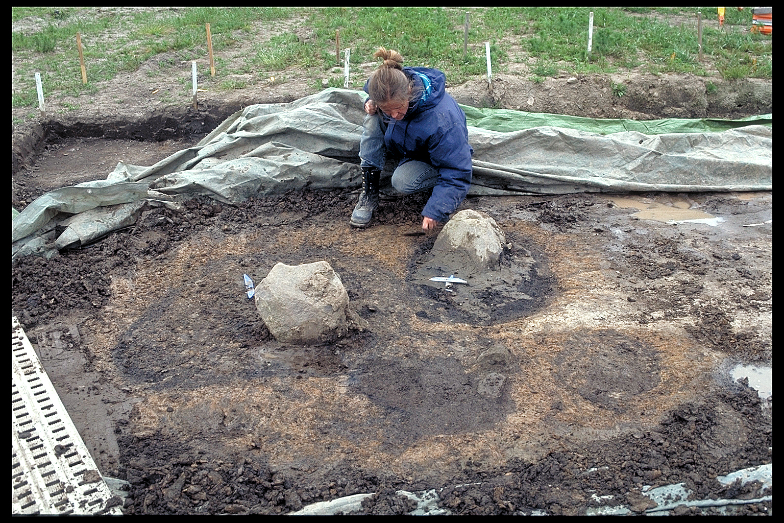 Stolhål från en av hallarna på Slöingeboplatsen (RAÄ-nummer Slöinge 114:1) i Slöinge socken, Årstads härad, Falkenbergs kommun, Halland, Hallands län, Sverige.